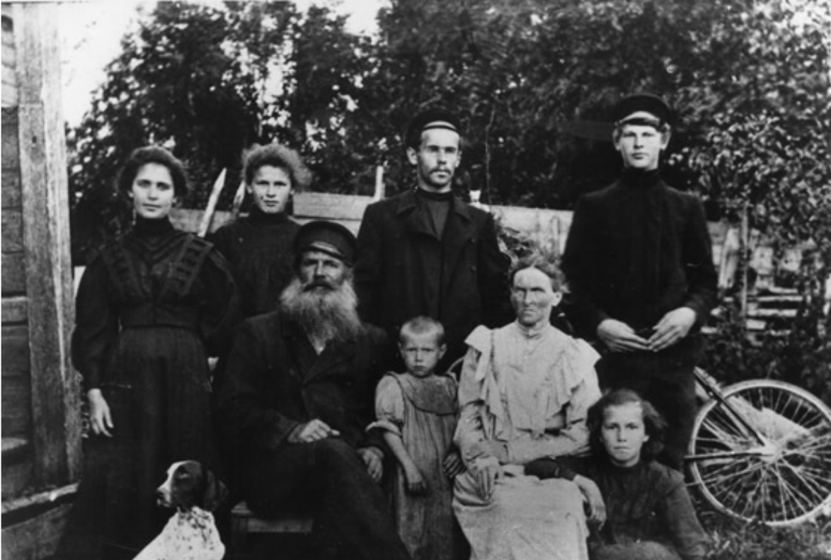 Групповое фото семьи Раменских, учителей из Тверской губернии